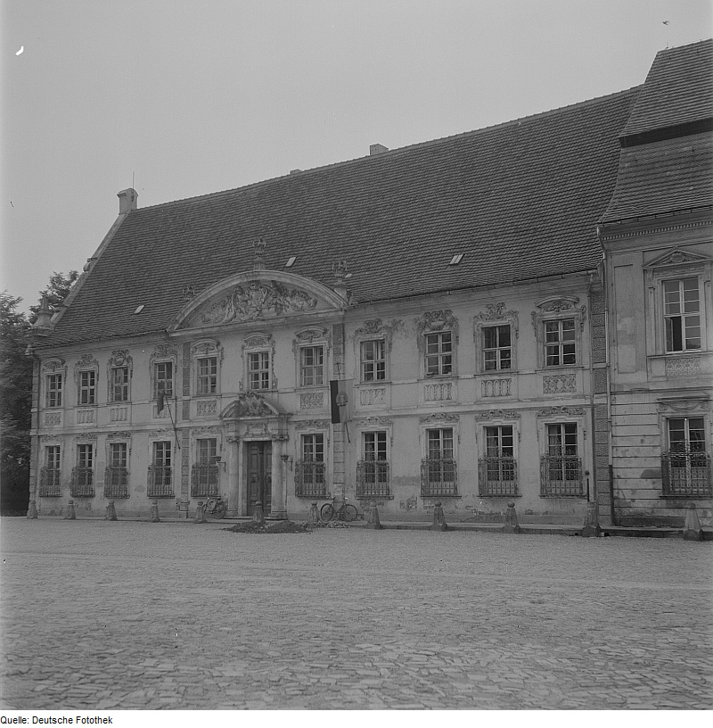 Original image description from the Deutsche Fotothek Zerbst. Ehemaliges Kavalierhaus (Lyzeum, 1705/1707)